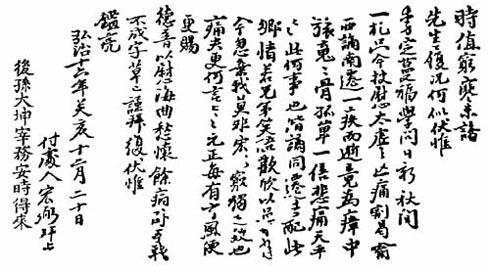 김굉필 친필 필적